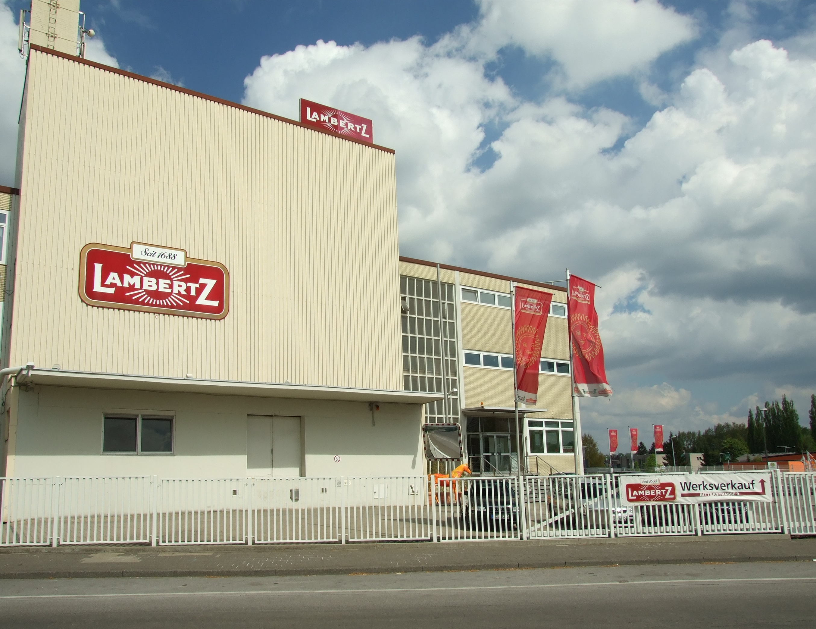 Lambertz-Werk in Aachen